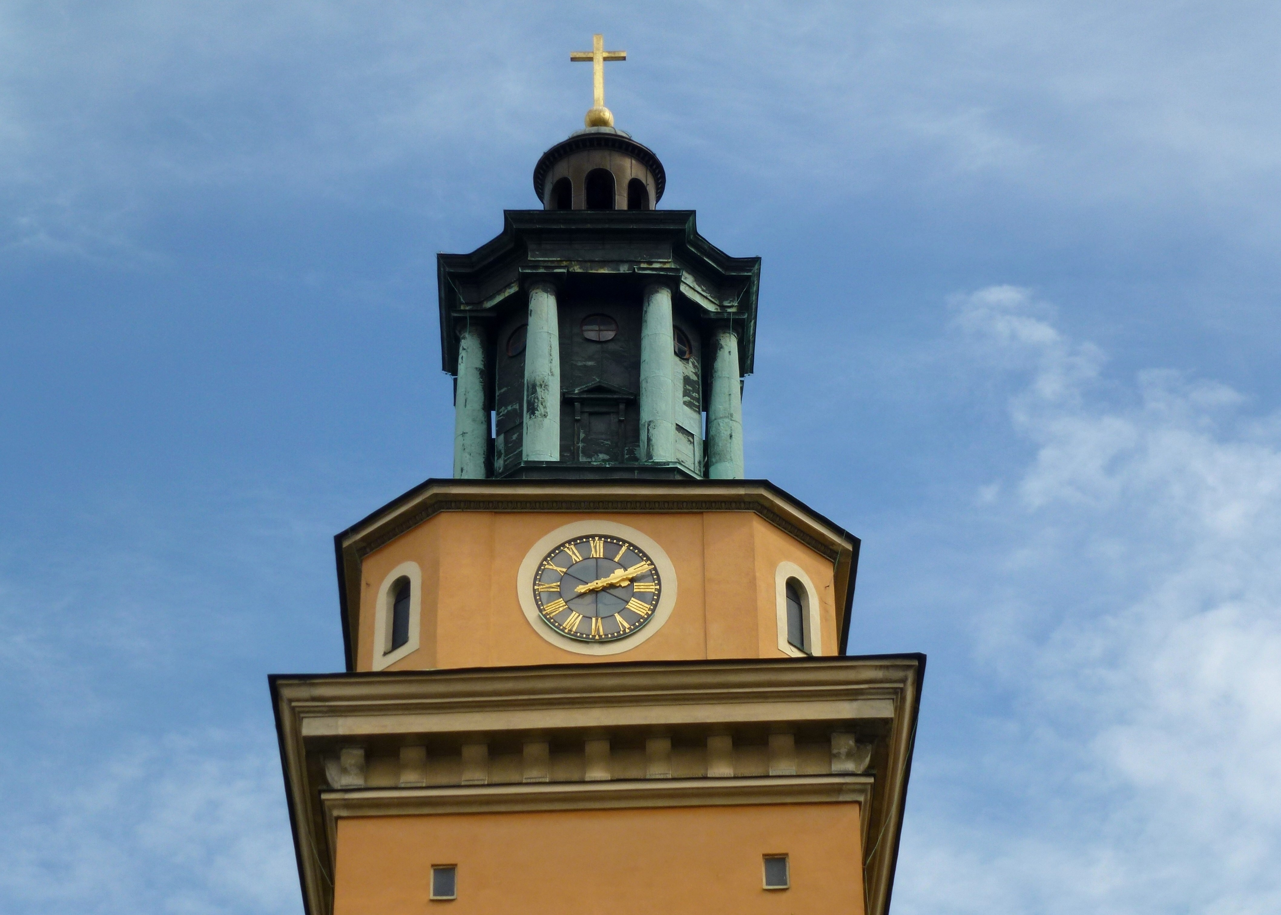 Maria Magdalenas kyrka torn